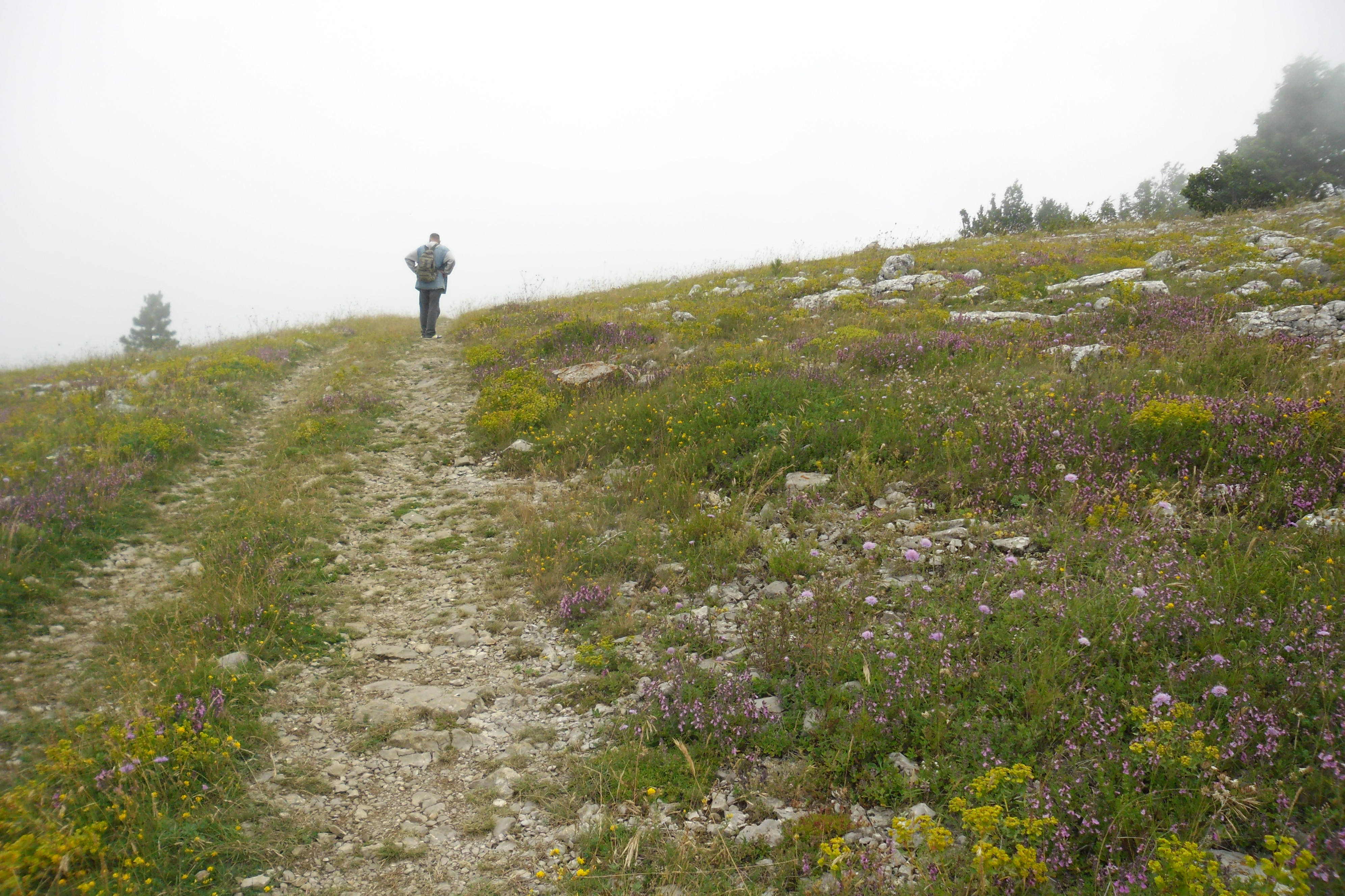 Фото